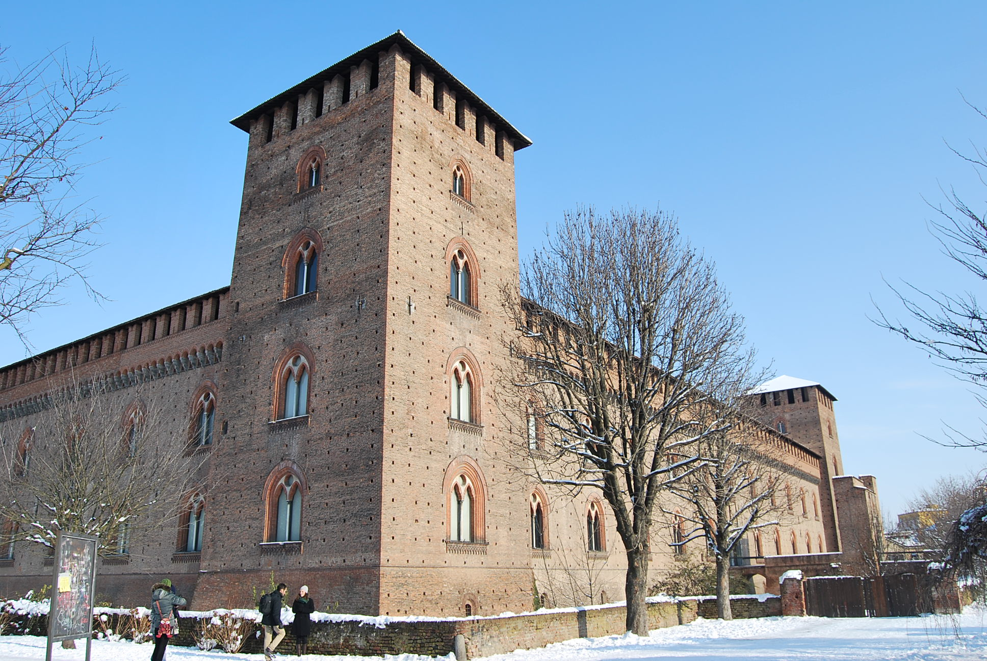 castello innevato